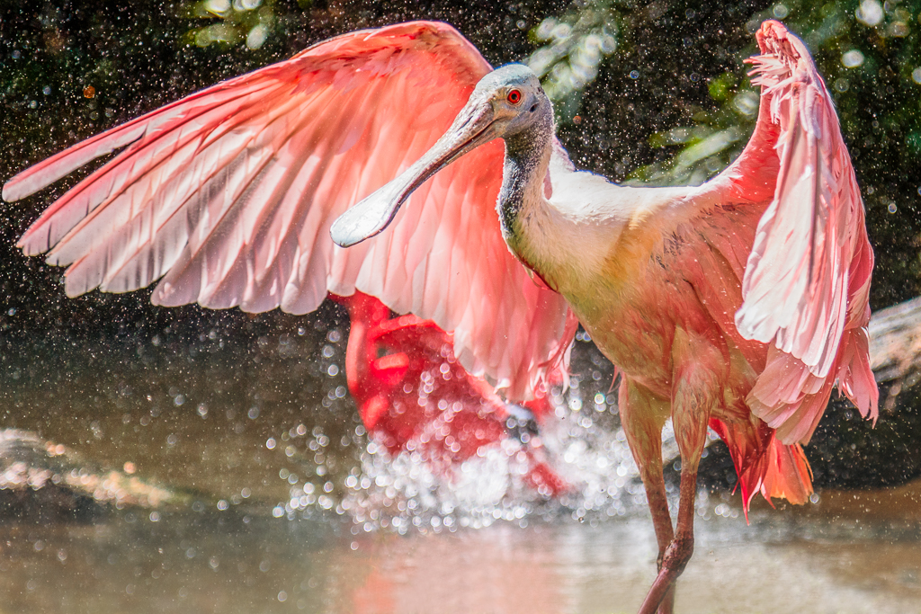 Rode lepelaar, roseate spoonbill (Platalea ajaja) in GaiaZOO, Kerkrade verlaat het water. Op de achtergrond neemt een rode Ibis een bad.